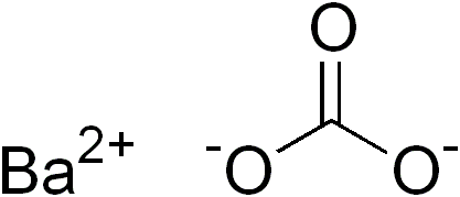 chemical structure of barium carbonate